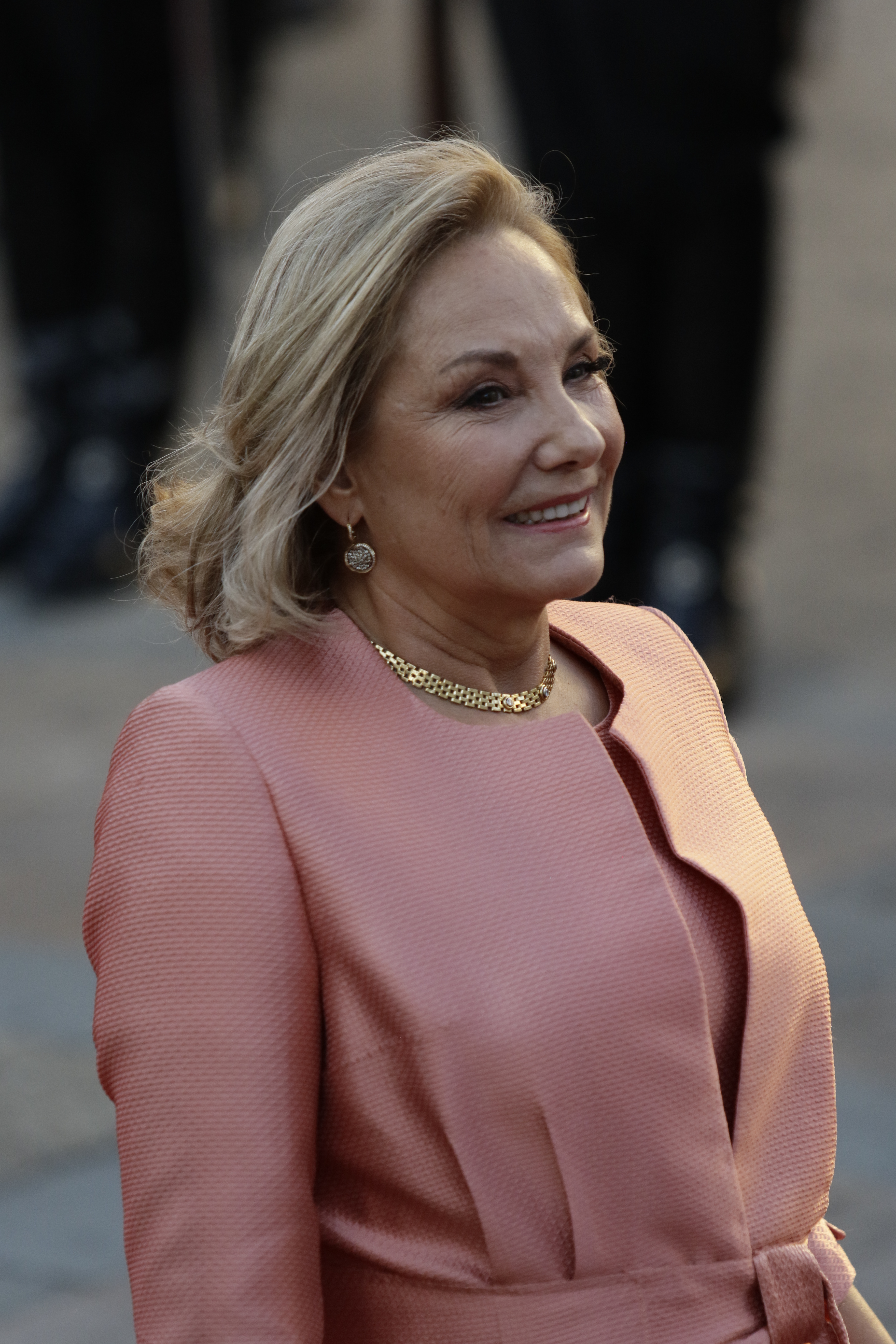 fotos: Andrea Robles y Rolando Morales.